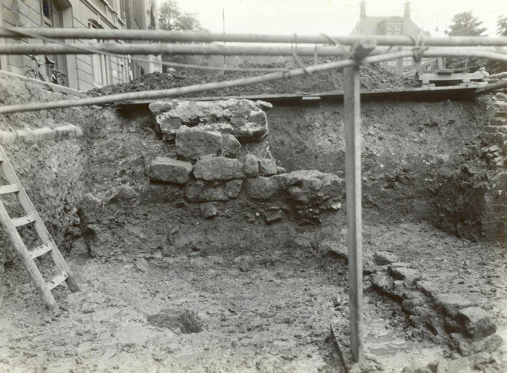 Archeologische opgraving in 1933 te Utrecht op het Domplein. In het midden van de foto is een stenen muur zichtbaar van een Romeinse barak in het castellum Traiectum.